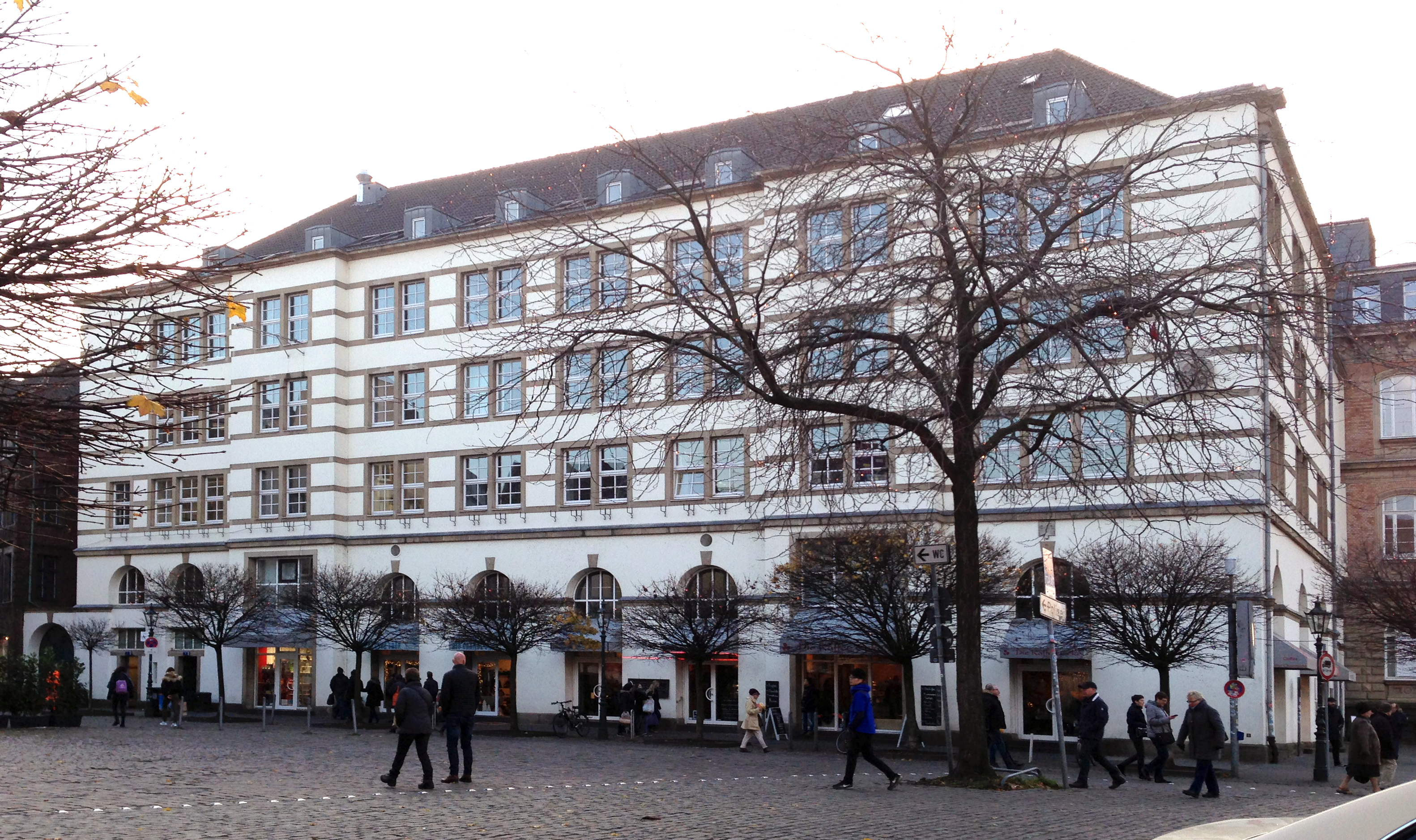 Burgplatz 3 mit Toreinfahrt zum Rathaus, öffentlichen Toiletten und Ladenlokalen; Sicht auf Ecke Burgplatz 2, Düsseldorf-Altstadt